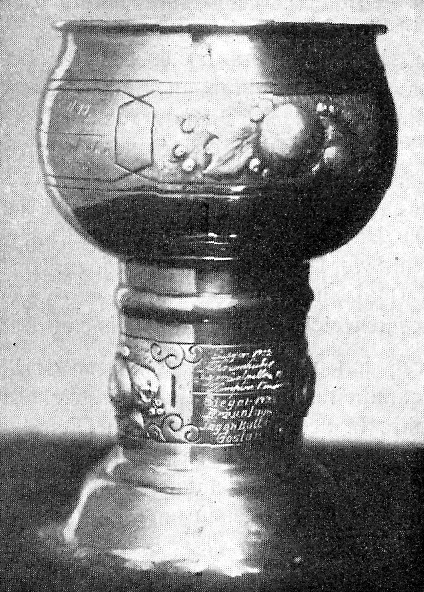 Schwedenbecher - Vom Schwedischen Skiverband gestifteter Wanderpreis